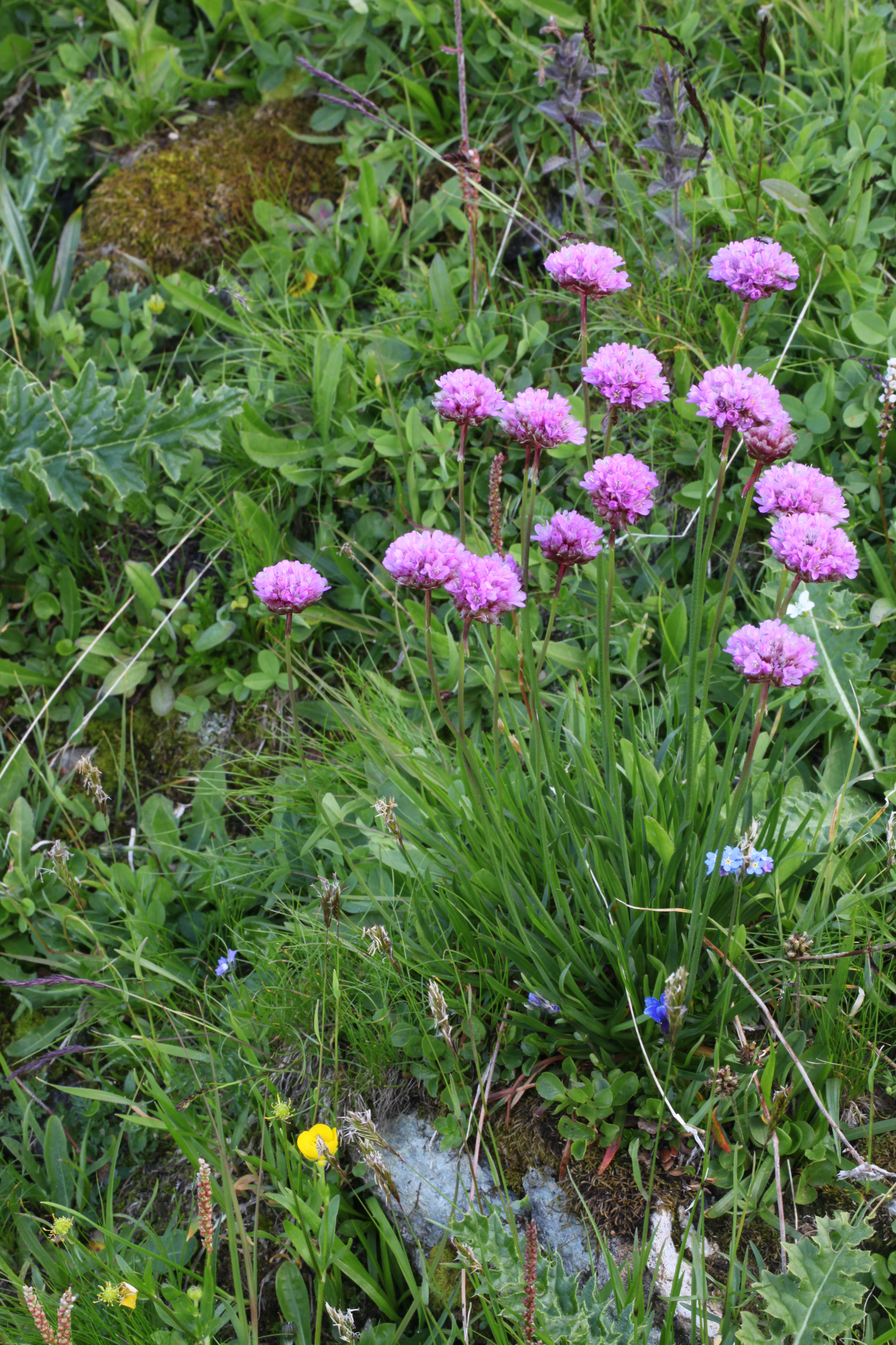 Fleurs d'Armérie des Alpes au lac d'Amour (Savoie).